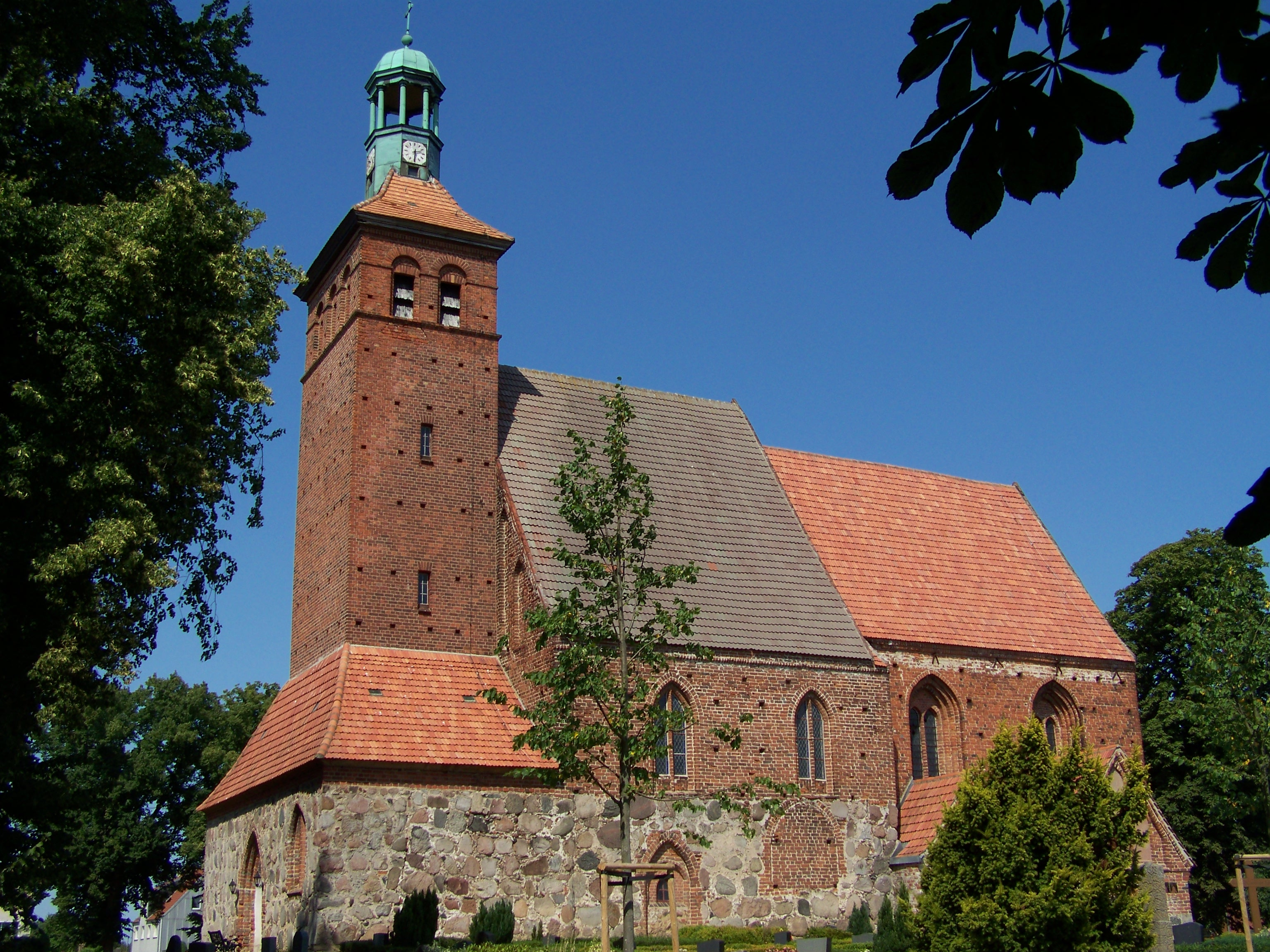 Reinkenhagen, Dorfkirche, von der Straße aus